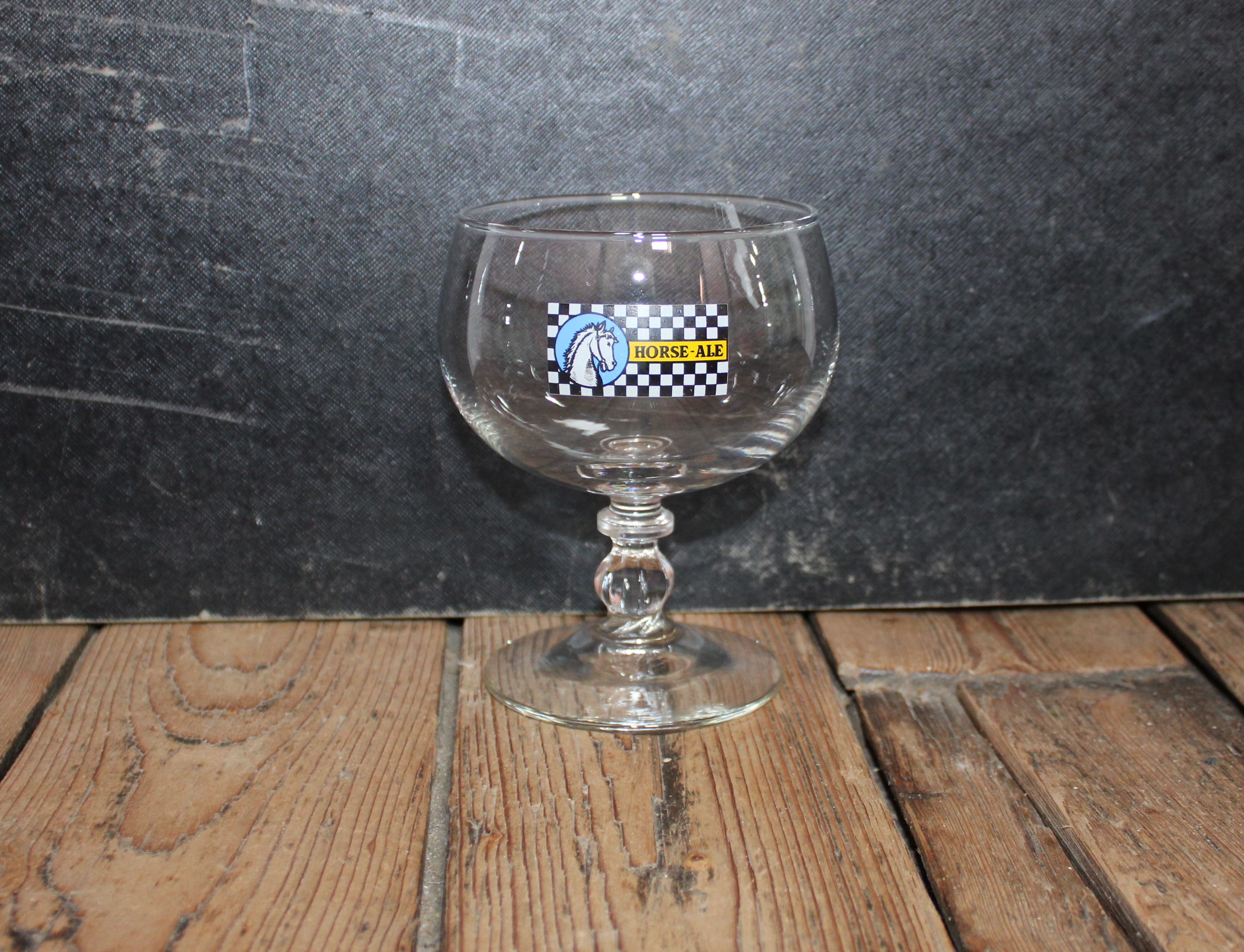 Verre à bière Horse-Ale